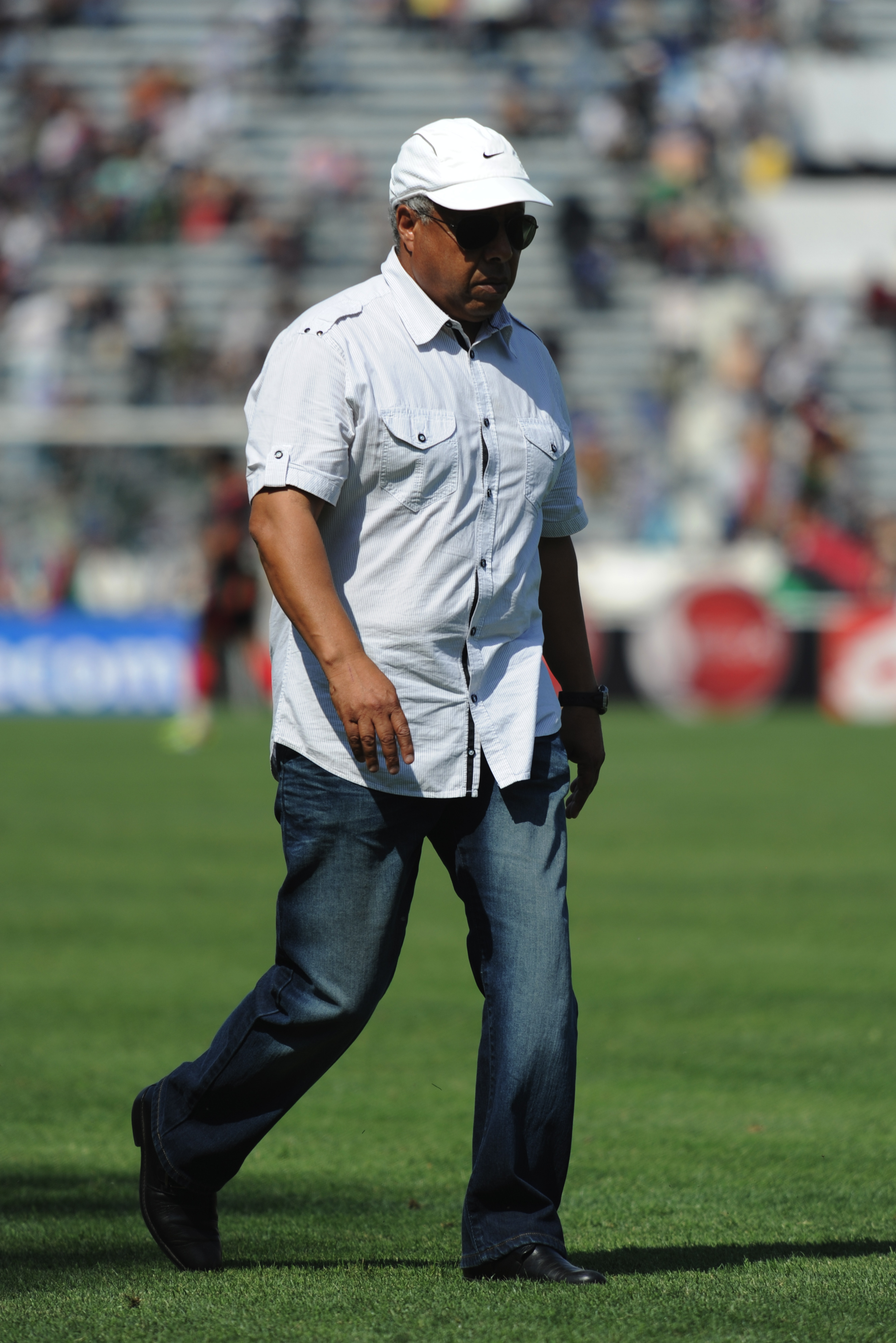 Mhamed Fakhir, entraîneur du Raja AC